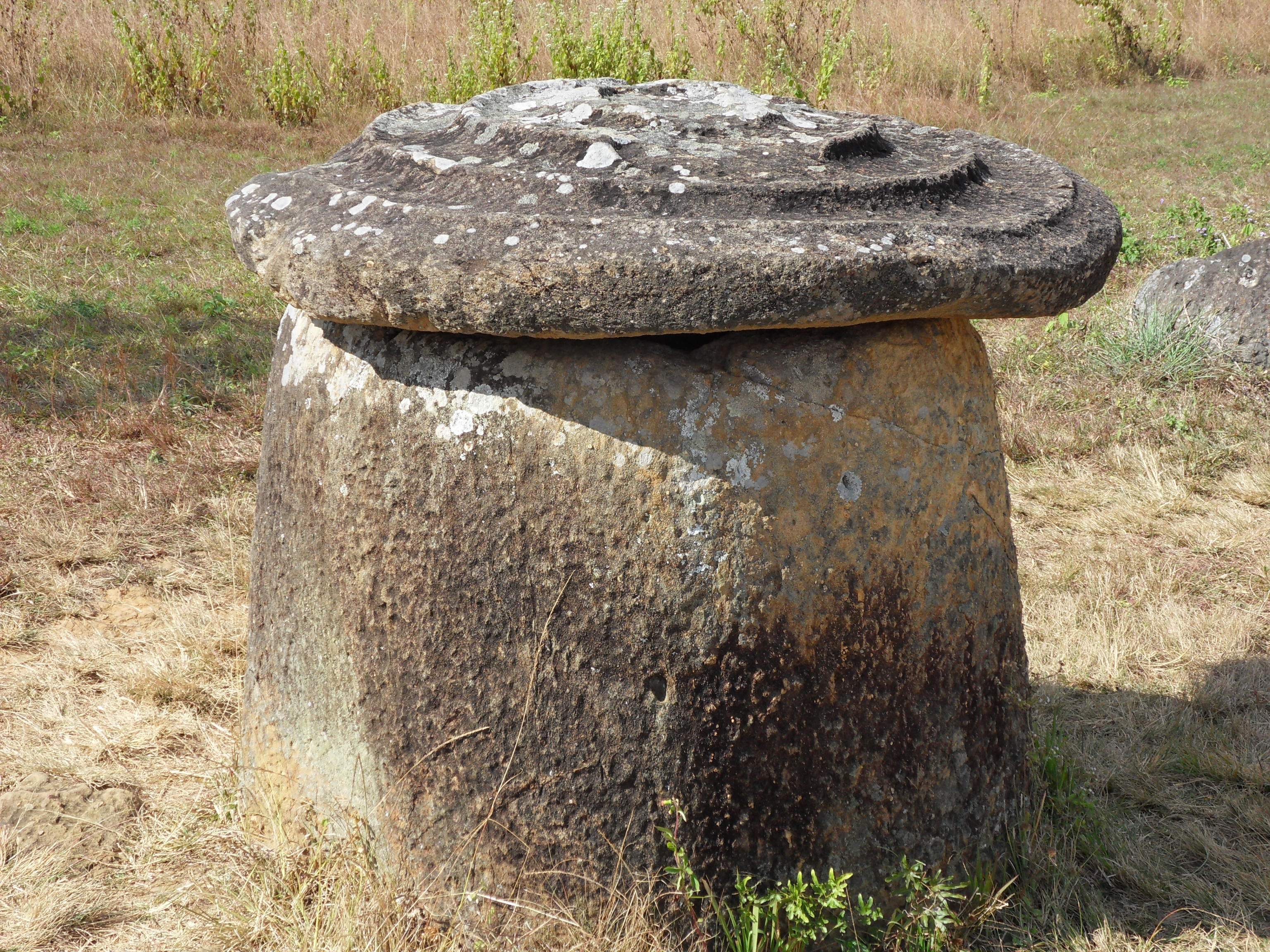 Une des jarres du site 1, avec un couvercle.